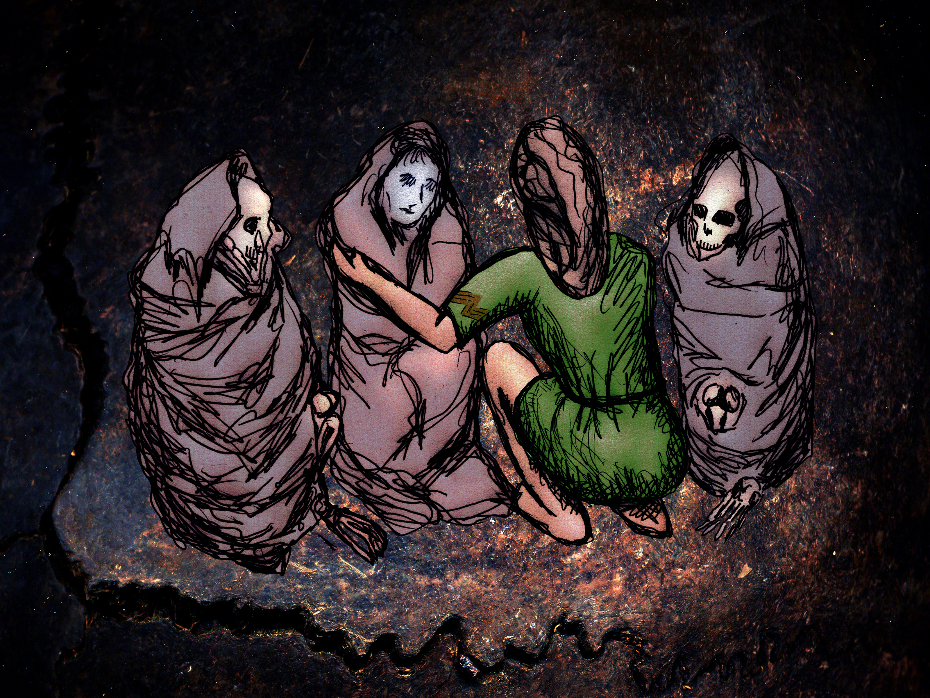 Utställningsbild (originalfil; blandteknik med tecknade och skannade element) skapad av arkeologen och konstnären Gunnar Creutz till den arkeologiska utställningen Hallonflickan sommaren 2011 på Falbygdens museum i Falköping. Bilden visar hur konstnären tänker sig att en begravning i en gånggrift för 5000 år sedan kunde gestaltat sig. På bilden ses en kvinna i grön klänning eller tunika på huk intill tre döda (varav två skelett) i sittande hocker i en mörk gravkammare. I konstnärens vision är kvinnan i grön klänning Hallonflickan medan den nyligen döda kvinnan är hennes "gammelmor" (troligen mormor), som var familjegruppens kvinnliga ledare. Den uppladdade filen är originalfilen, som utställningsbilden skrevs ut från.